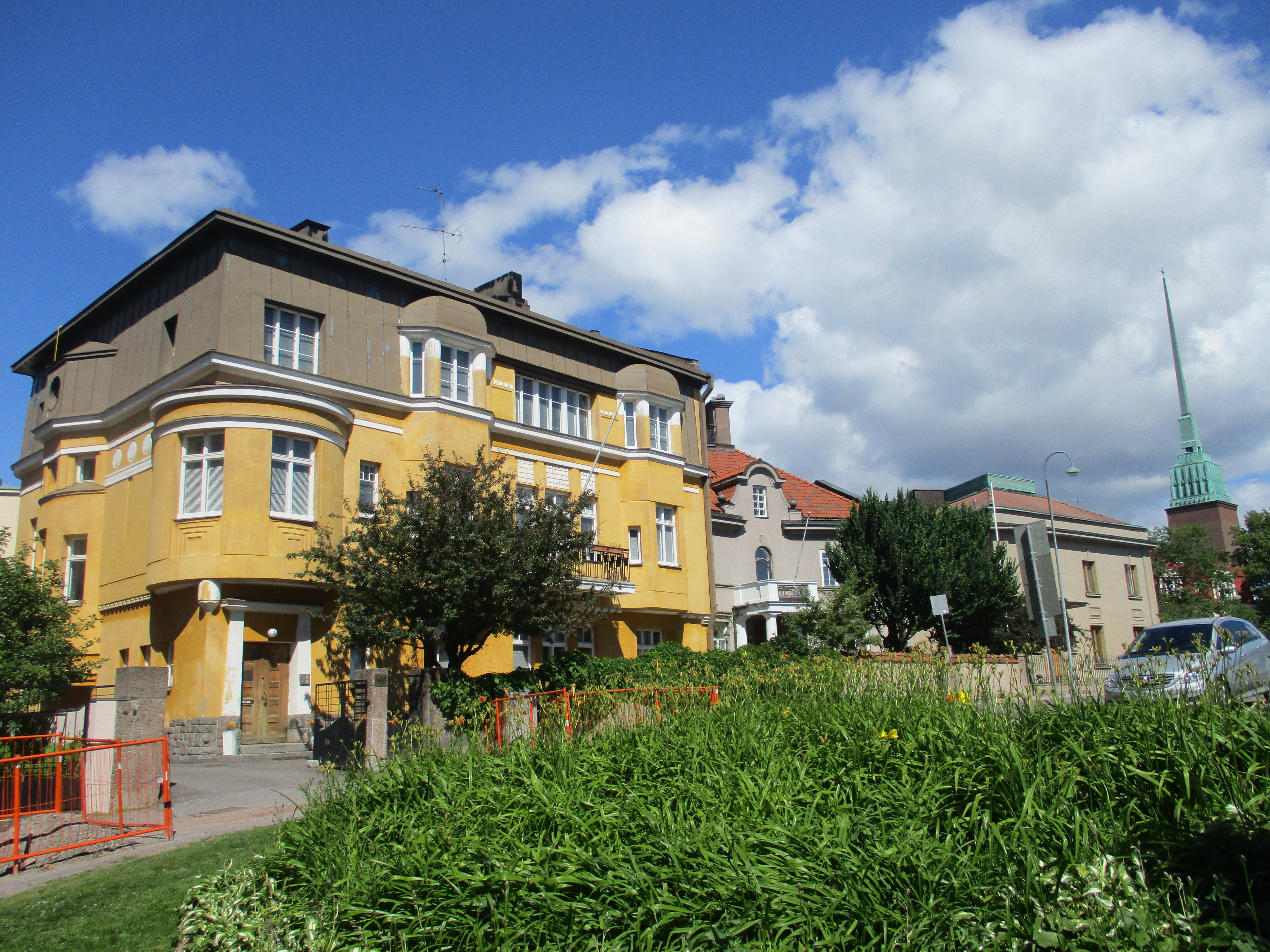 Eira; This is a photo of a monument in Finland identified by the ID 'Eira' (Q1310518)